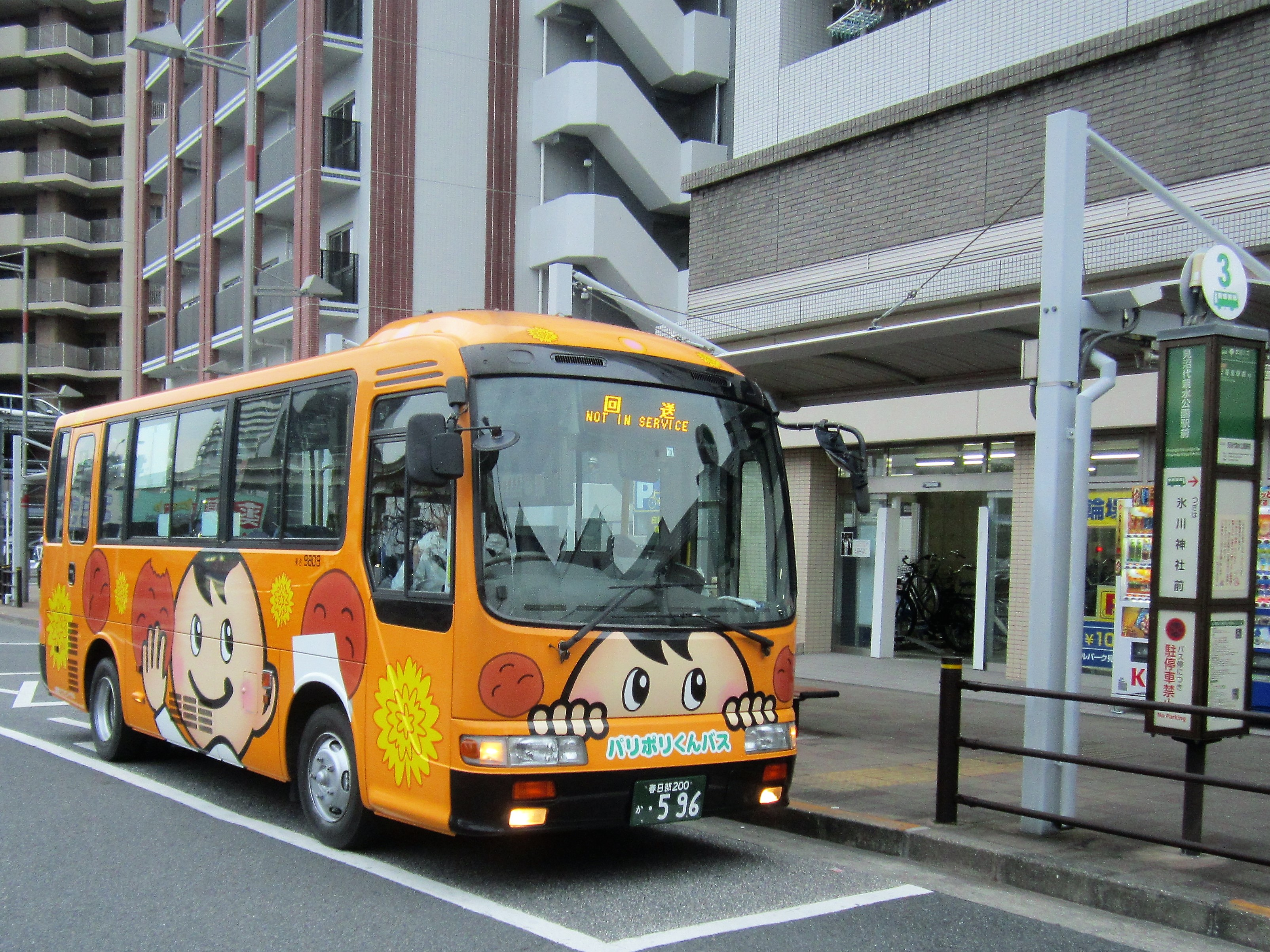 見沼代親水公園駅前に停車中の草加市コミュニティバス「パリポリくんバス」